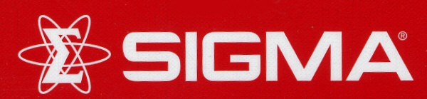 Logo der Sigma-Aldrich-Firma Sigma